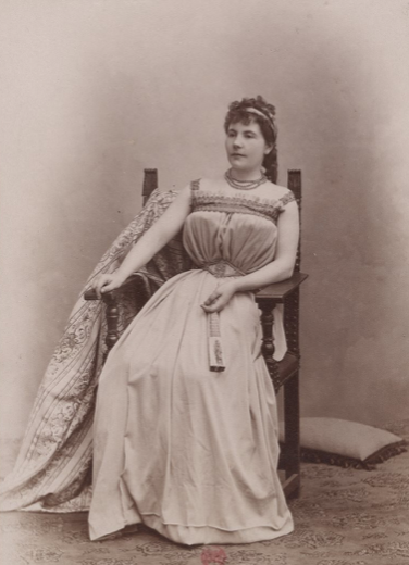 Blanche Deschamps-Jéhin chanteuse lyrique